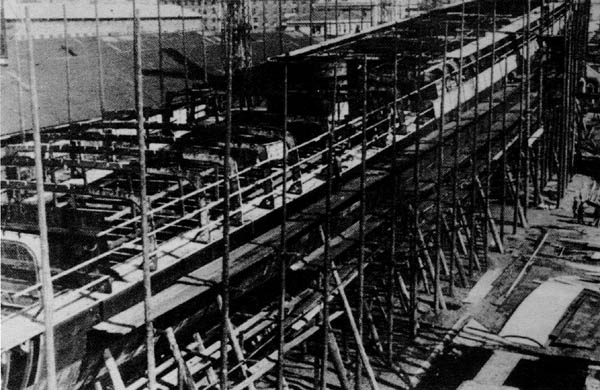 Линкор "Джулио Чезаре" ("Giulio Cesare") на стапеле, 11 ноября 1910 г.